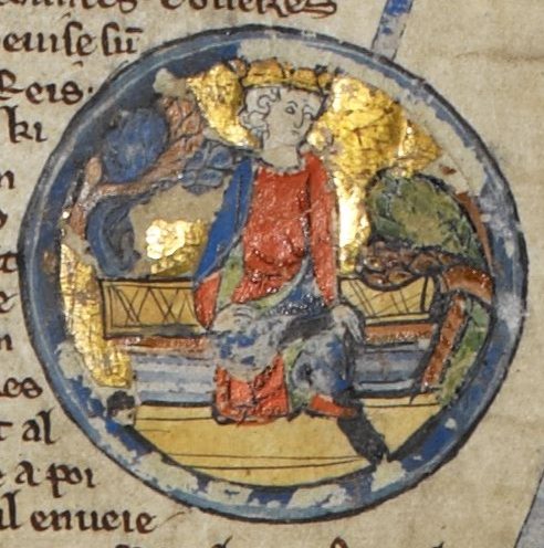 Miniature d'Æthelred de Wessex dans une généalogie royale du XIIIe siècle.